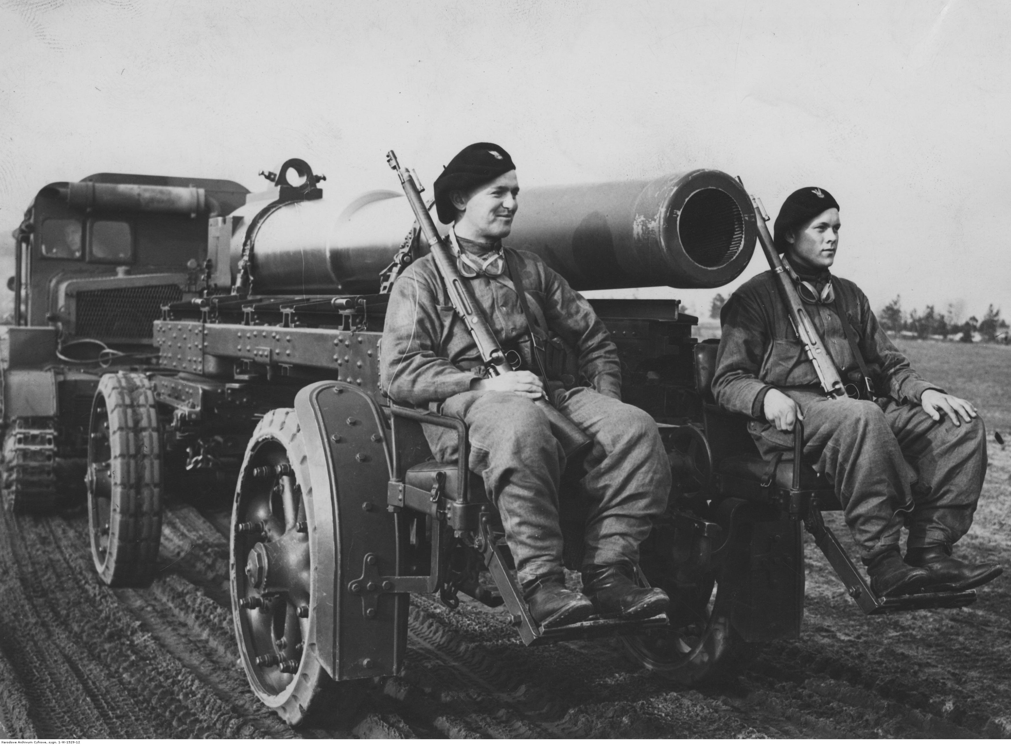 Ciężkie moździerze 220 mm wz. 32. Ciągnik artyleryjski C7P, który ciągnie przyczepę z lufą do moździerza 220mm wz.32. Na przyczepie siedzi dwóch artylerzystów uzbrojonych w karabiny Mauser 7,92 mm wz. 1898. Koncern Ilustrowany Kurier Codzienny - Archiwum Ilustracji. Sygnatura: 1-W-1529-12